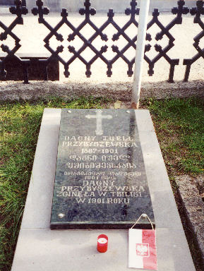 Nowe miejsce spoczynku szczątków Dagny Juel Przybyszewskiej w Tbilisi po ekshumacji w 1999 roku